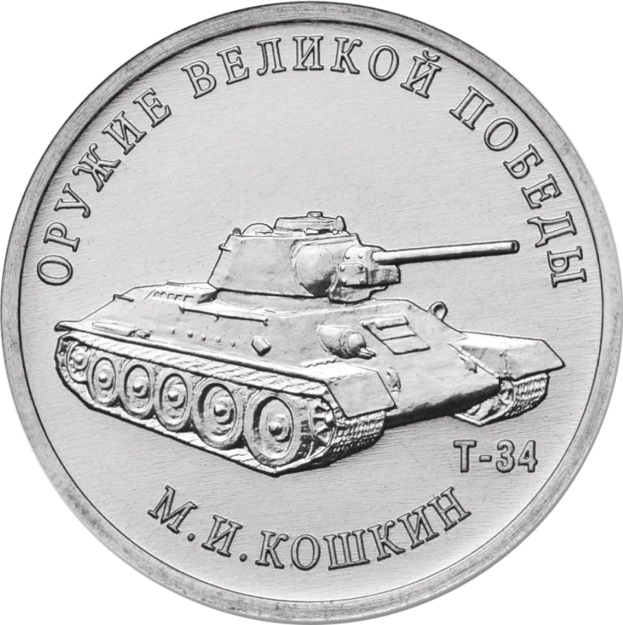 Монета Банка России. 25 рублей, реверс, анциркулейтед. Медно-никелевый сплав. Серия «Оружие Великой Победы (конструкторы оружия)». Конструктор оружия М.И. Кошкин, средний танк Т-34. Рельефное изображение среднего танка Т-34, под ним справа – надпись «Т-34»; вдоль канта – надписи, вверху: «ОРУЖИЕ ВЕЛИКОЙ ПОБЕДЫ», внизу: «М.И. КОШКИН». Художник: Е.В. Крамская. Скульптор: О.Г. Шепель Московский монетный двор.